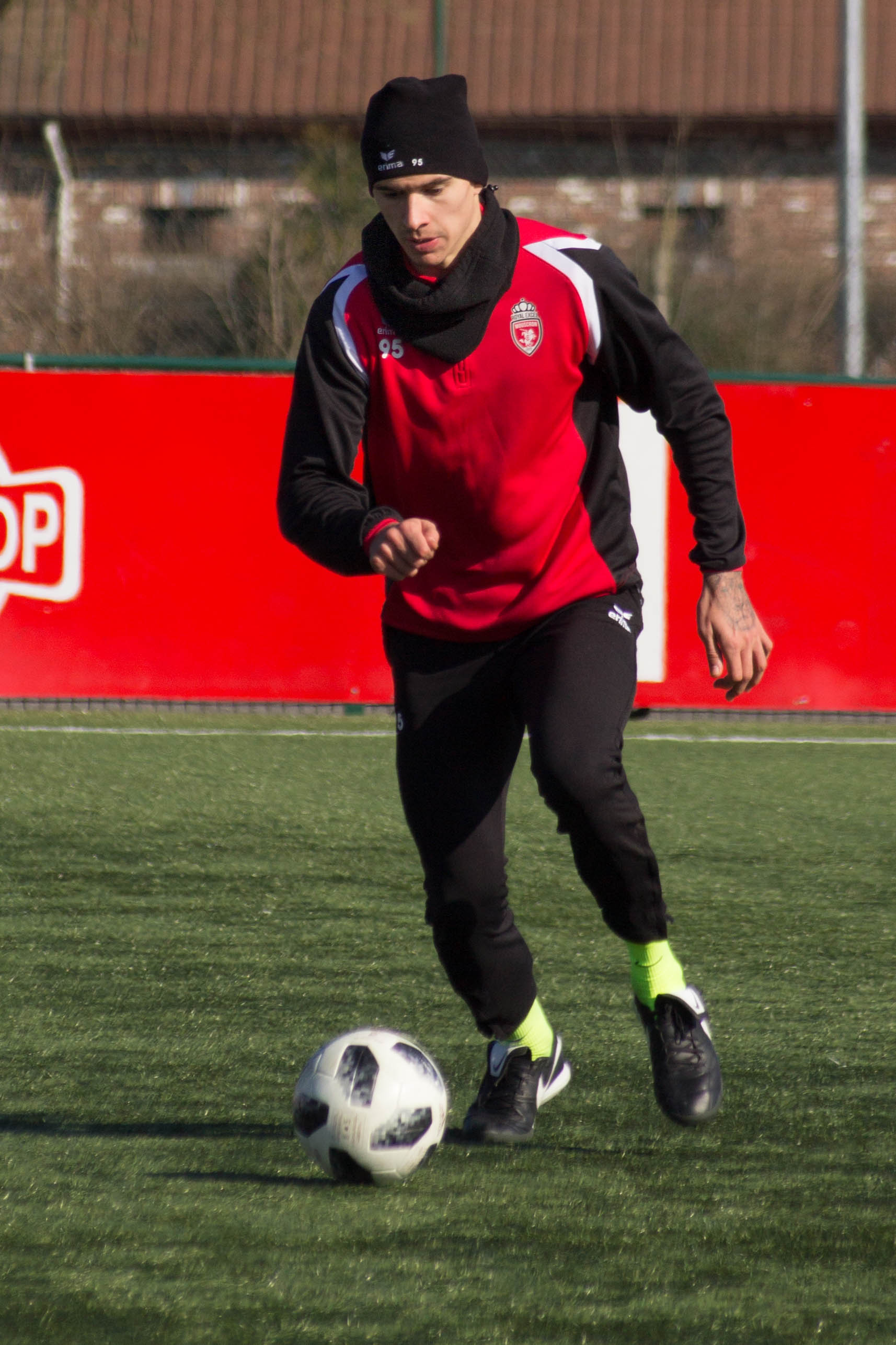 Entrainement du Royal Excel Mouscron, Futurosport, Mouscron. Le 22 Février 2018.